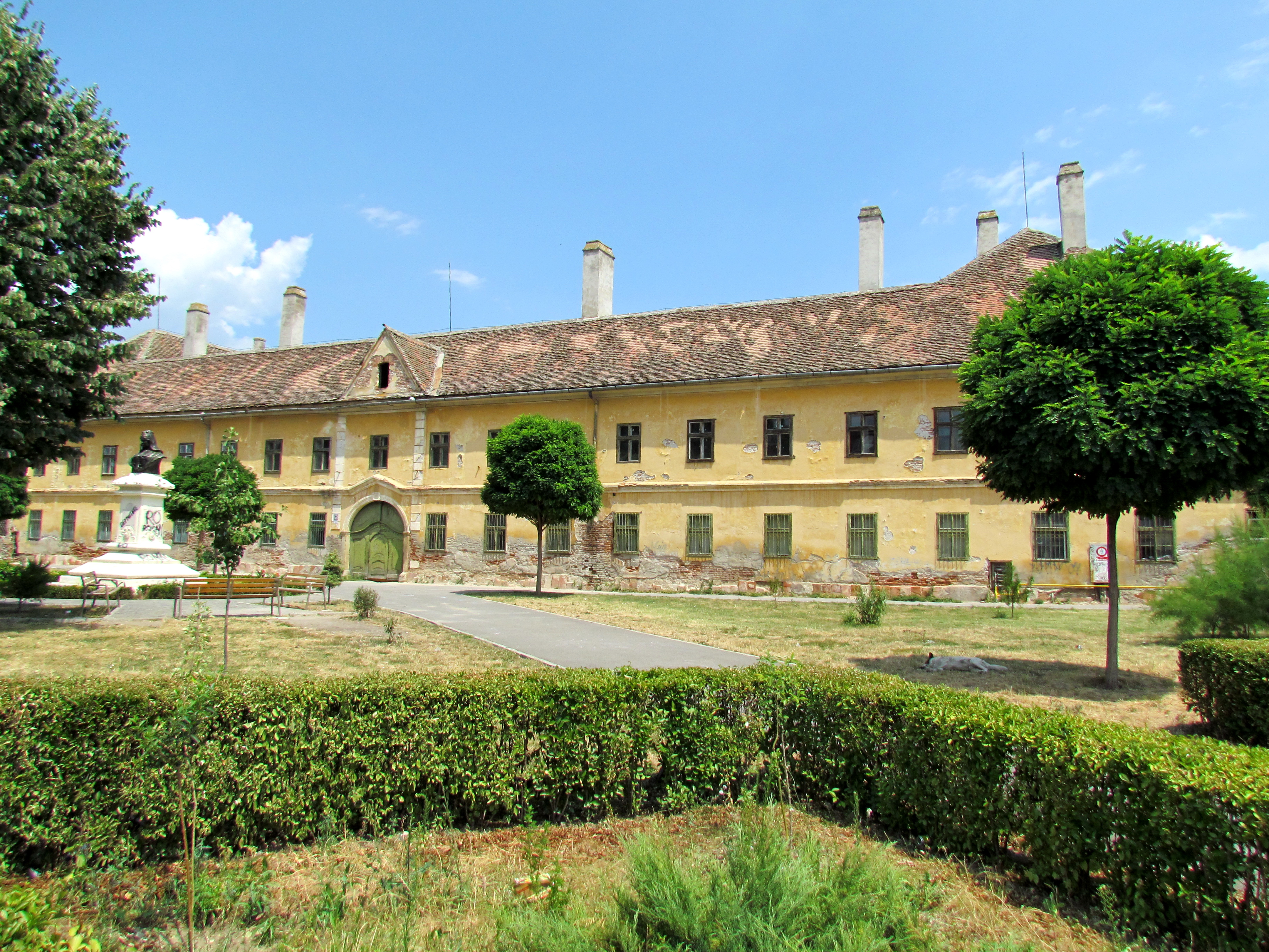 Fostul orfelinat, azi internatele și atelierele Grupului Școlar "Independența" și ale Grupului Școlar Alimentar 01